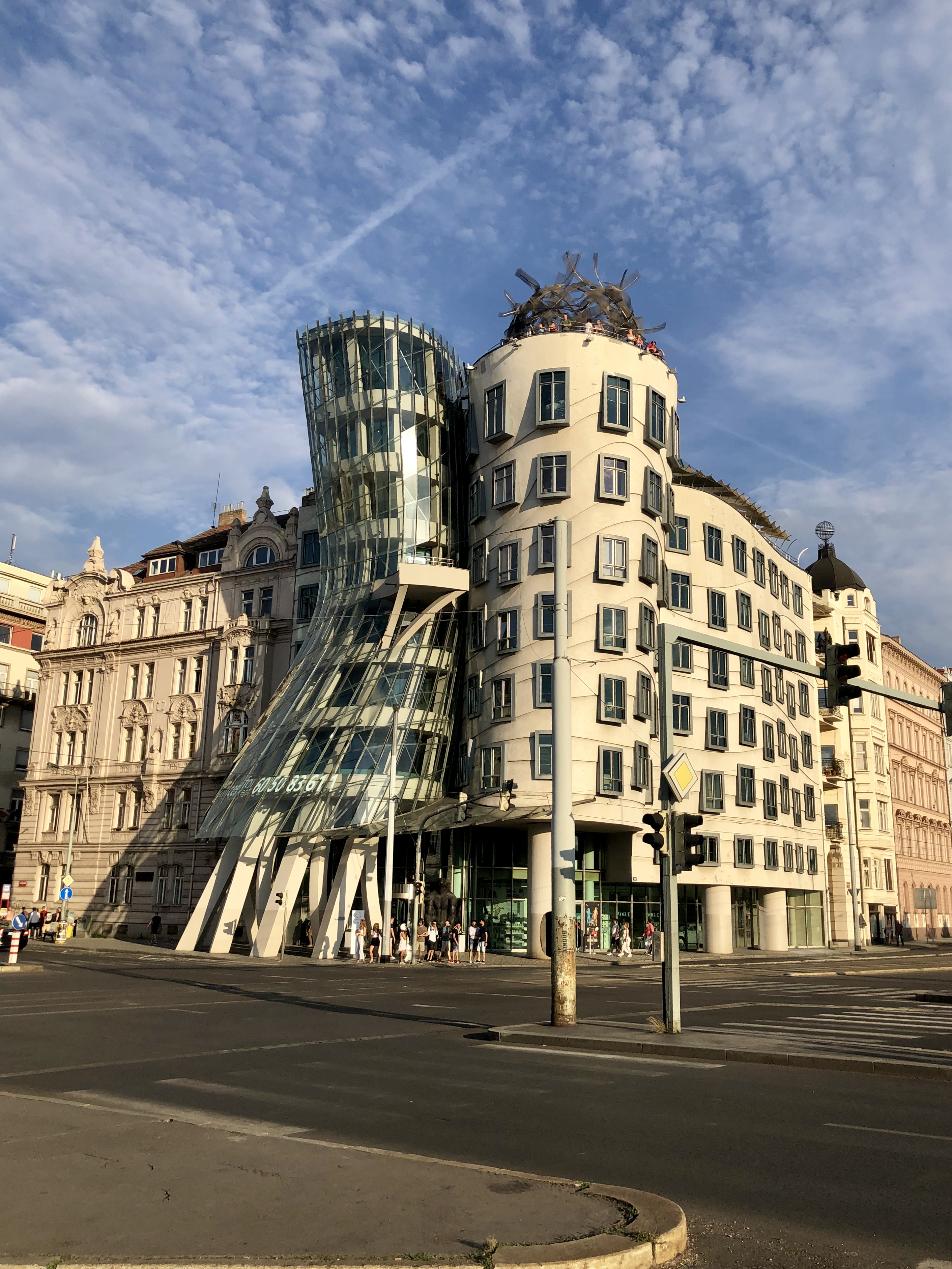 Foto tomada por Sharith garcia en julio 2019